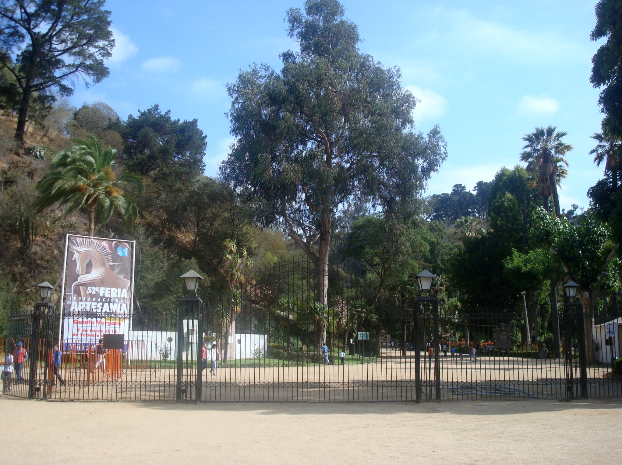 Quinta Vergara, Viña del Mar, Chile